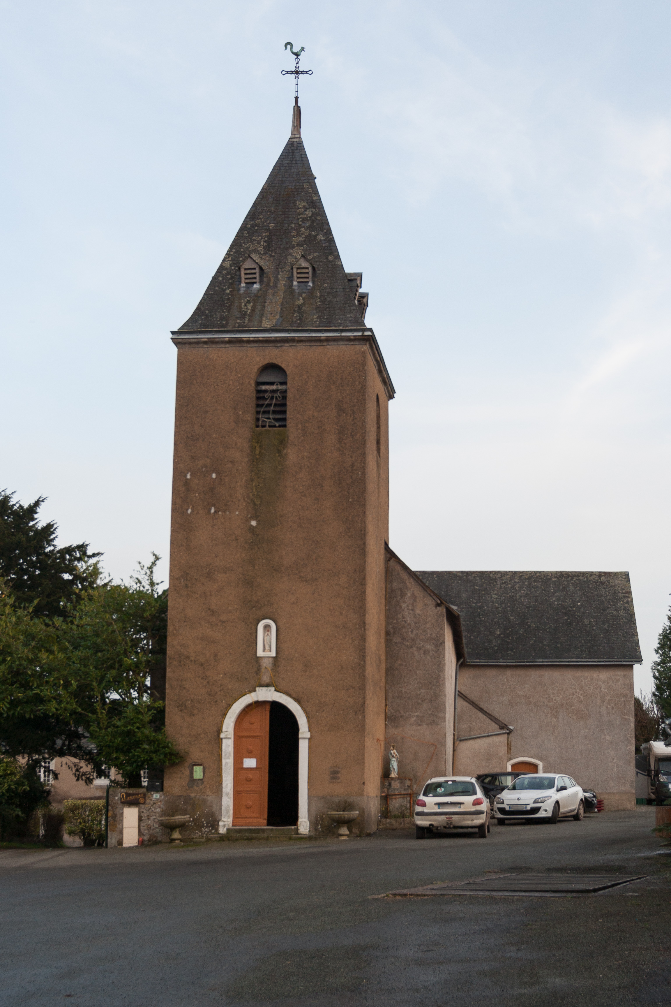 Église Saint-Gemme de Neuvillette-en-Charnie.